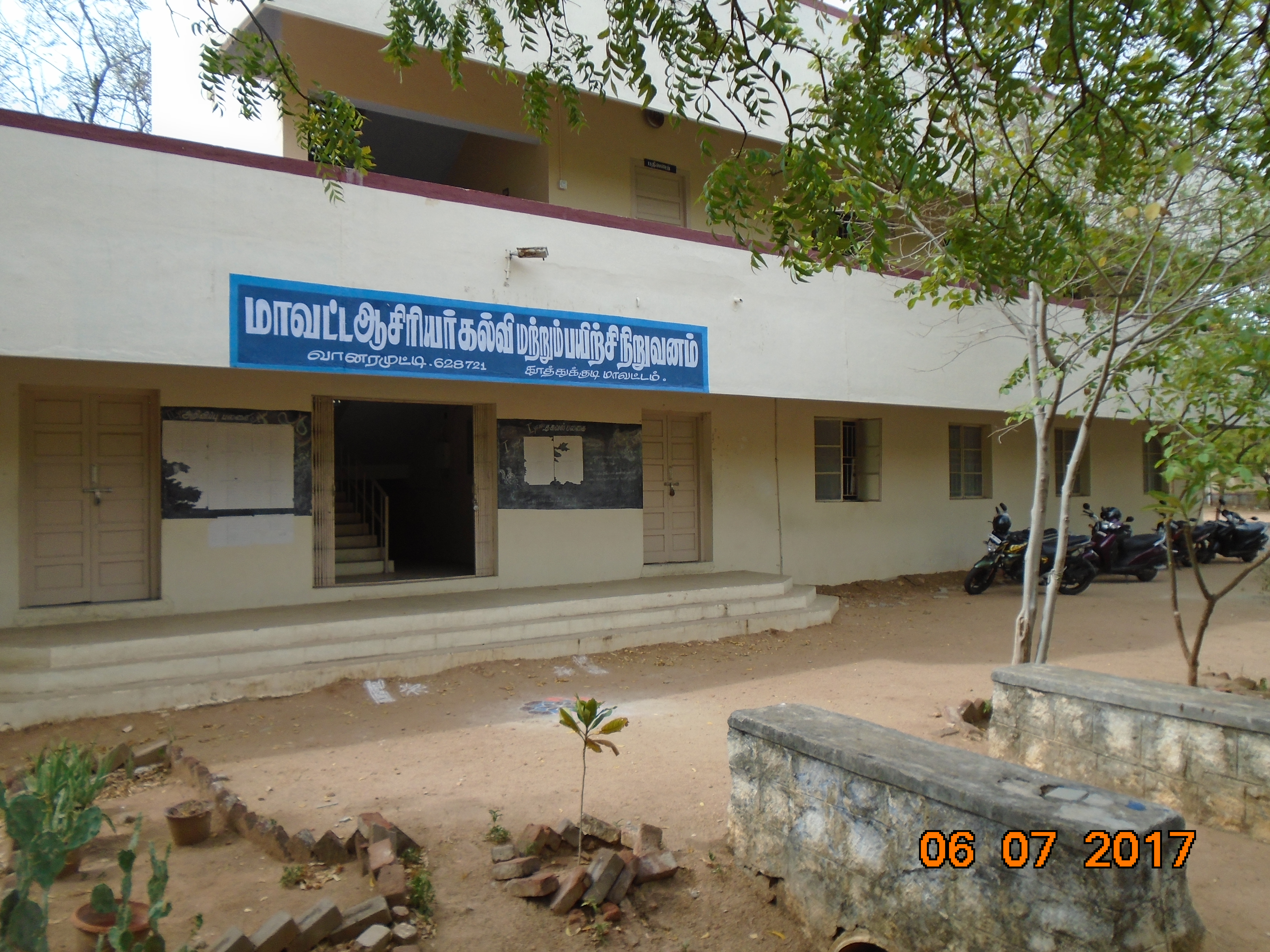 மாவட்ட ஆசிரியர் கல்வி மற்றும் பயிற்சி நிறுவனம் வானரமுட்டி. துாத்துக்குடி மாவட்டம்